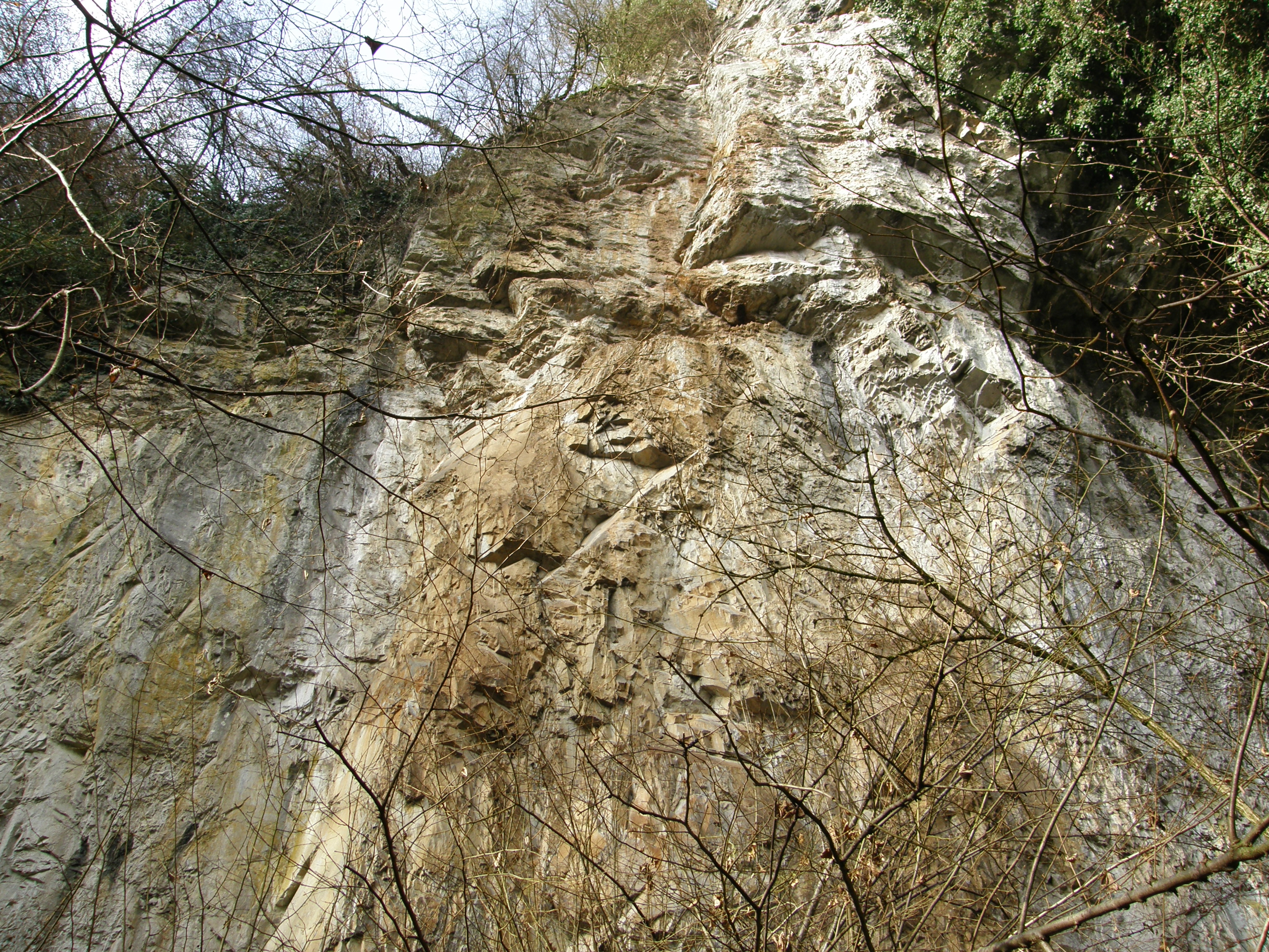 A cliff over Zijalo, Slovenia